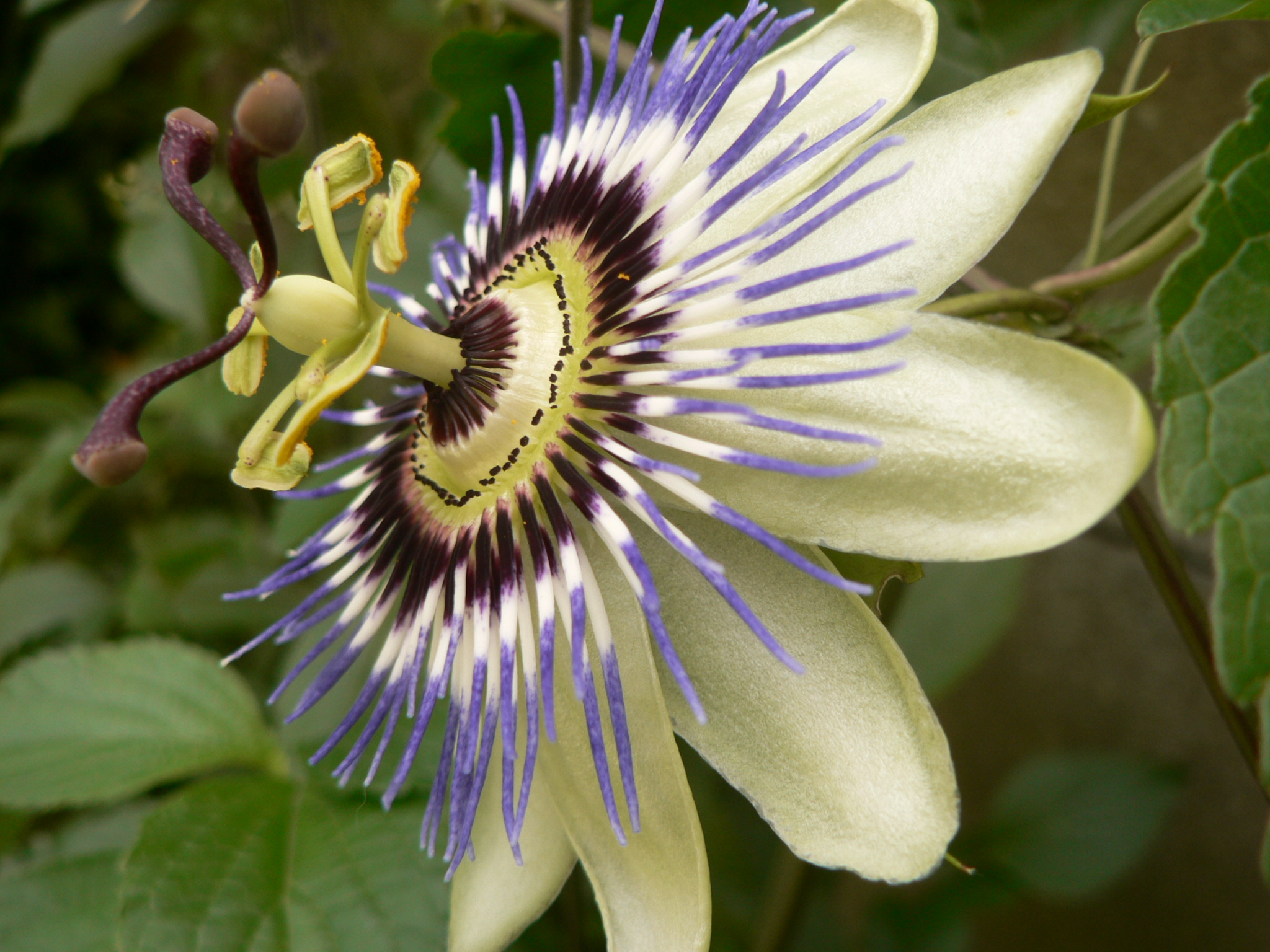 Passiflore bleue vue de profil